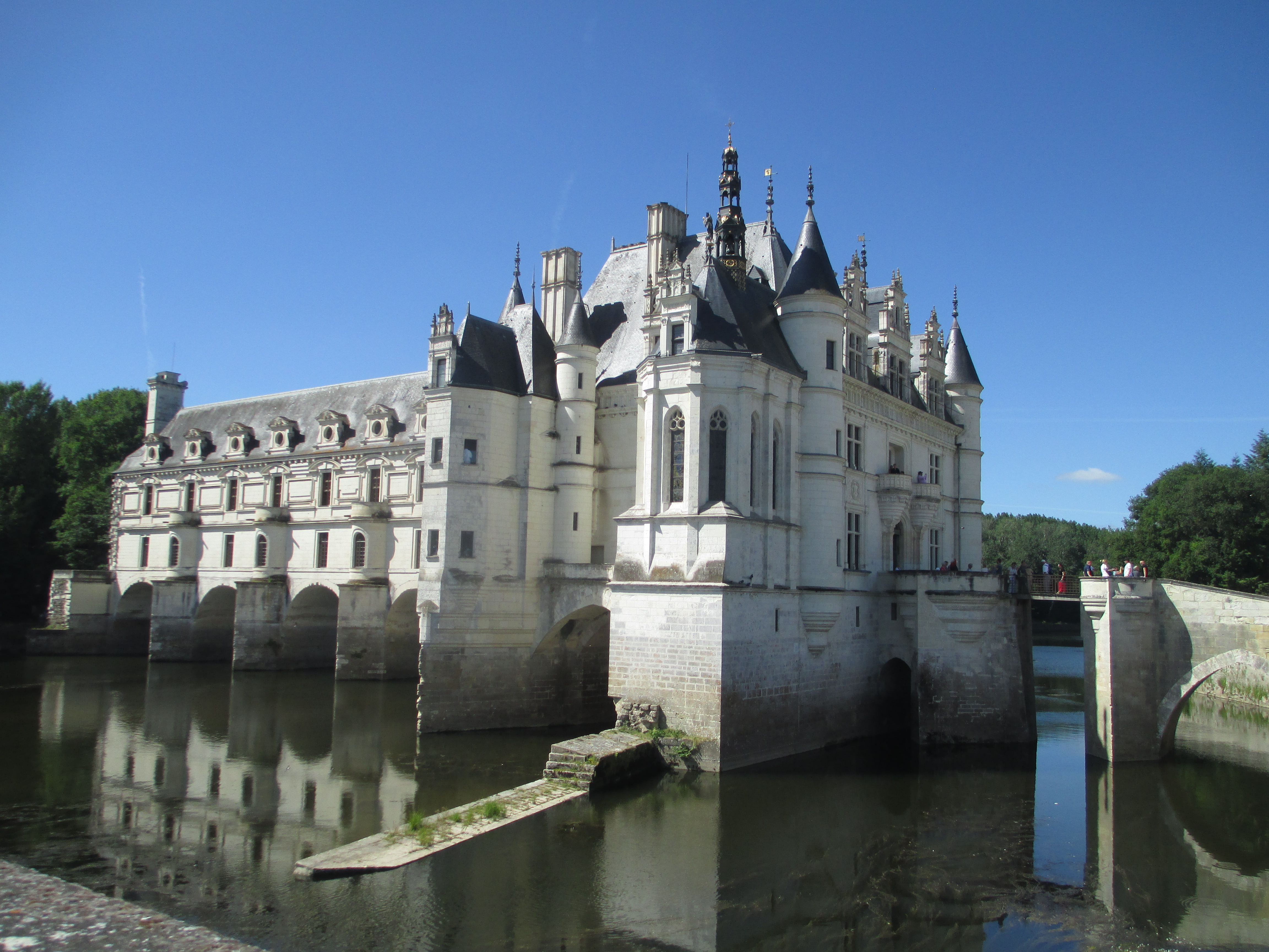 טירת שנונסו על נהר שר